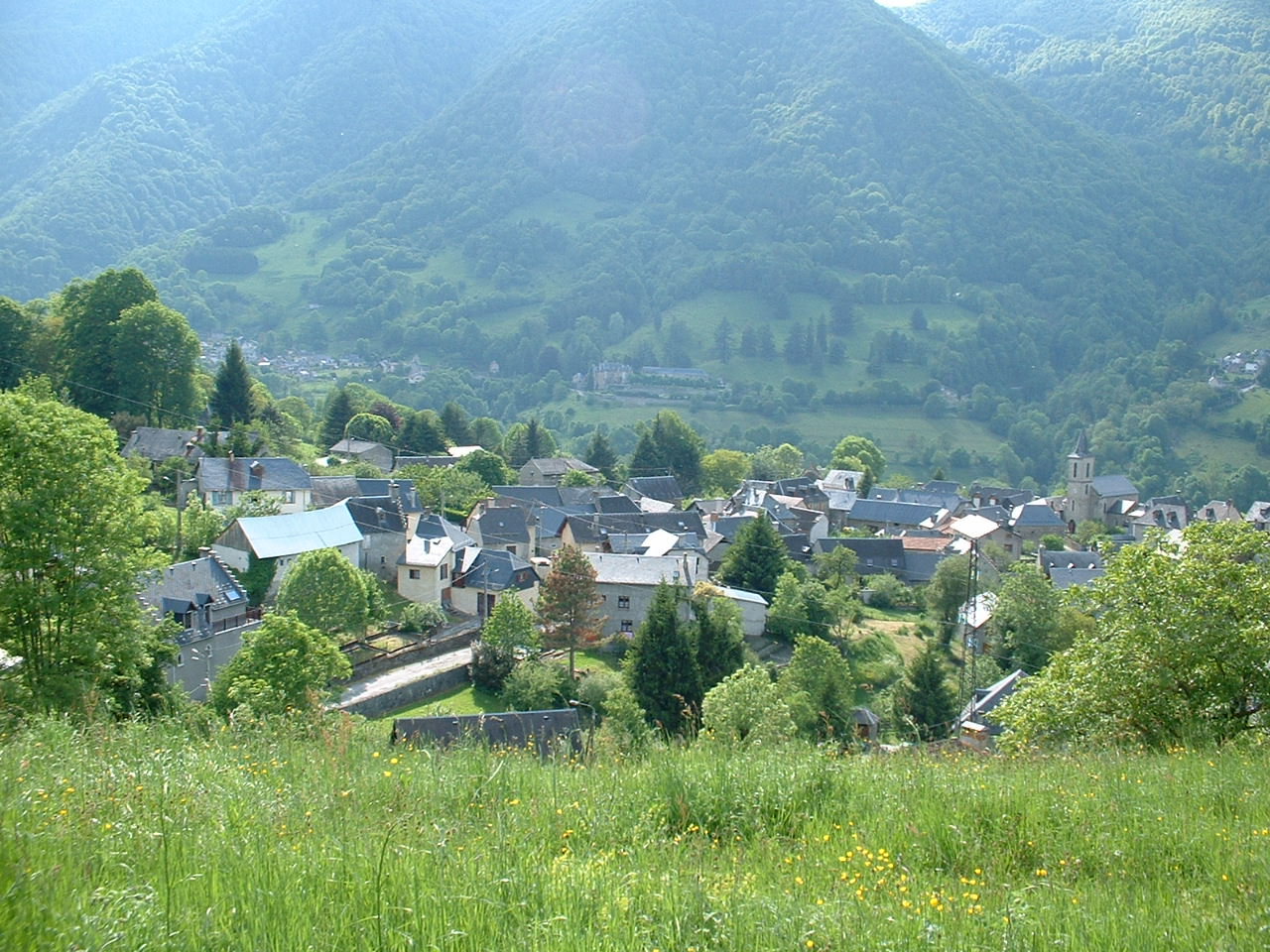 Burgalays 2005/05/20